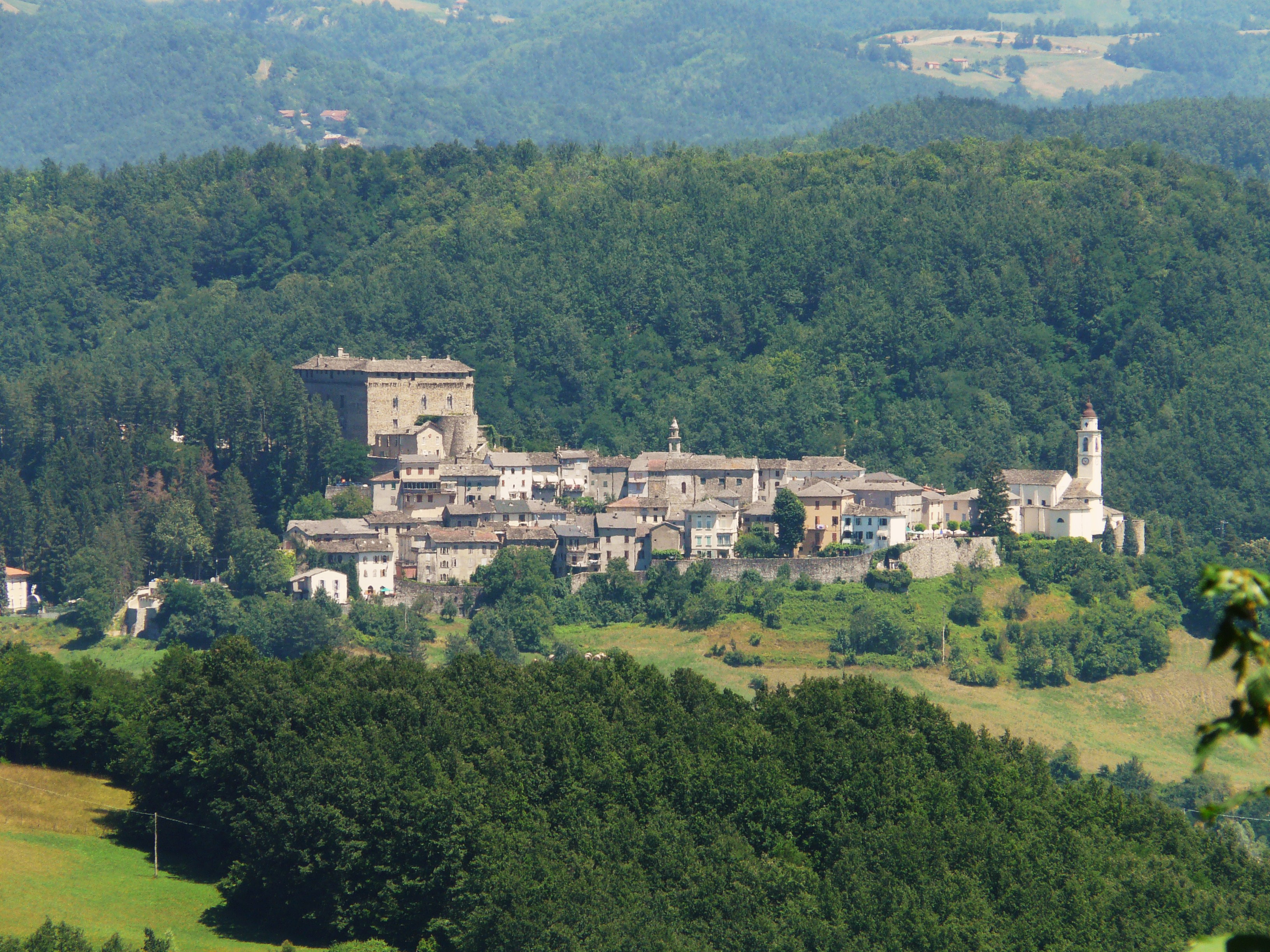 Panorama di Compiano, Emilia Romagna, Italia